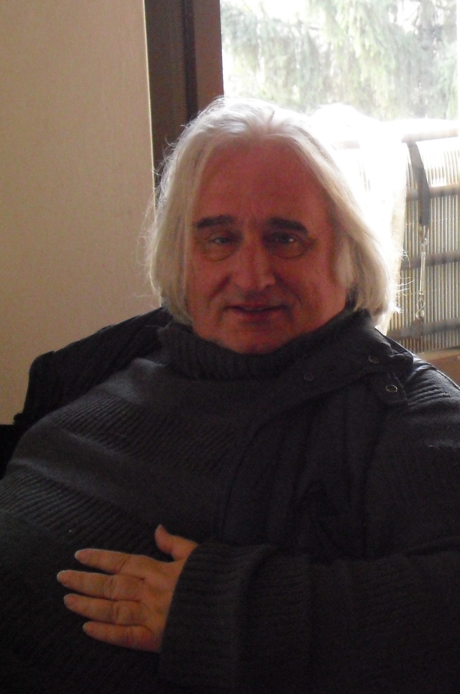 filosofo italiano